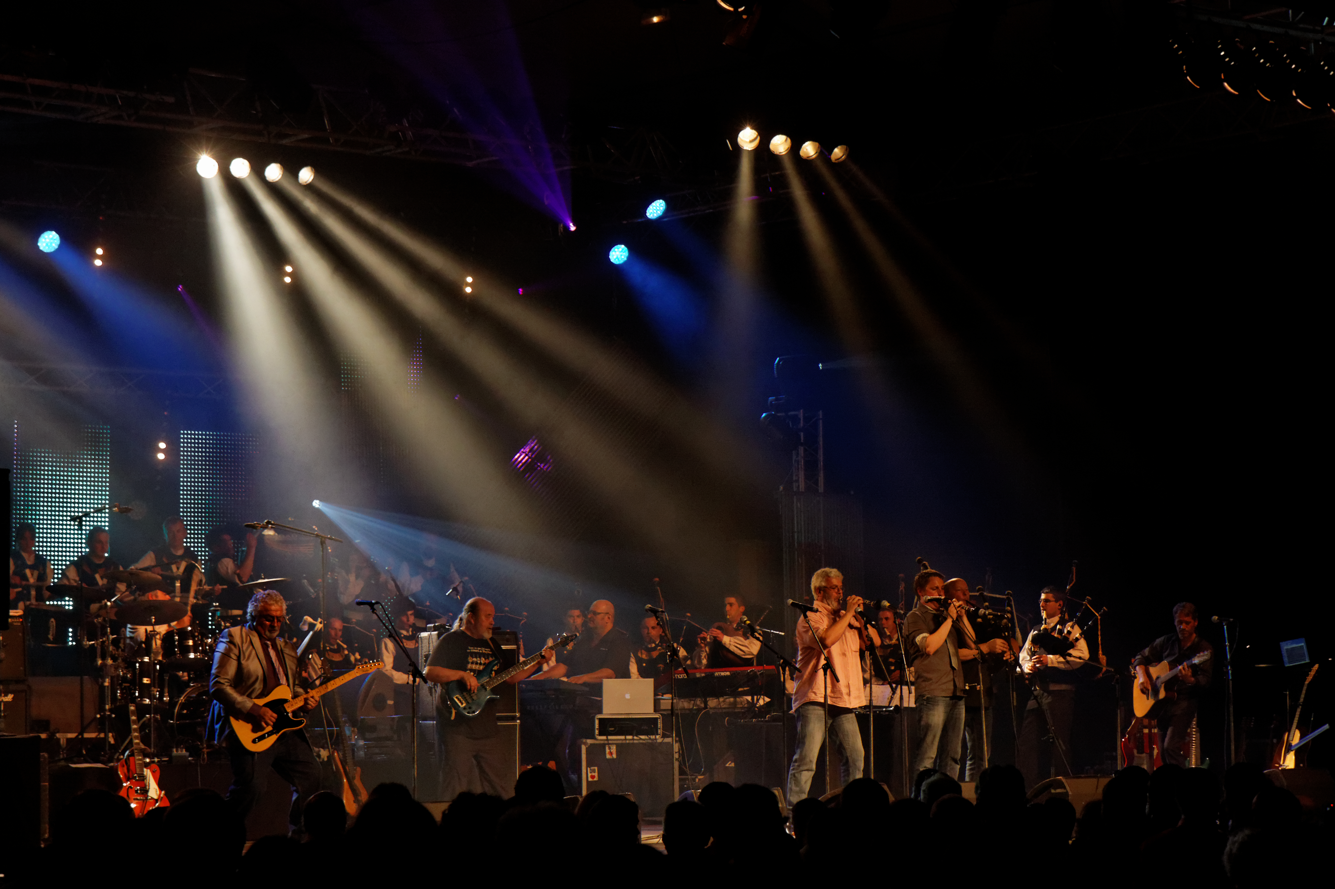 Les Sonerien Du fêtent leurs 40 ans en concert à l'espace Gradlon lors du festival de Cornouaille 2012. Le bagad Ar Meilhoù Glaz accompagne les Sonerien sur scène.